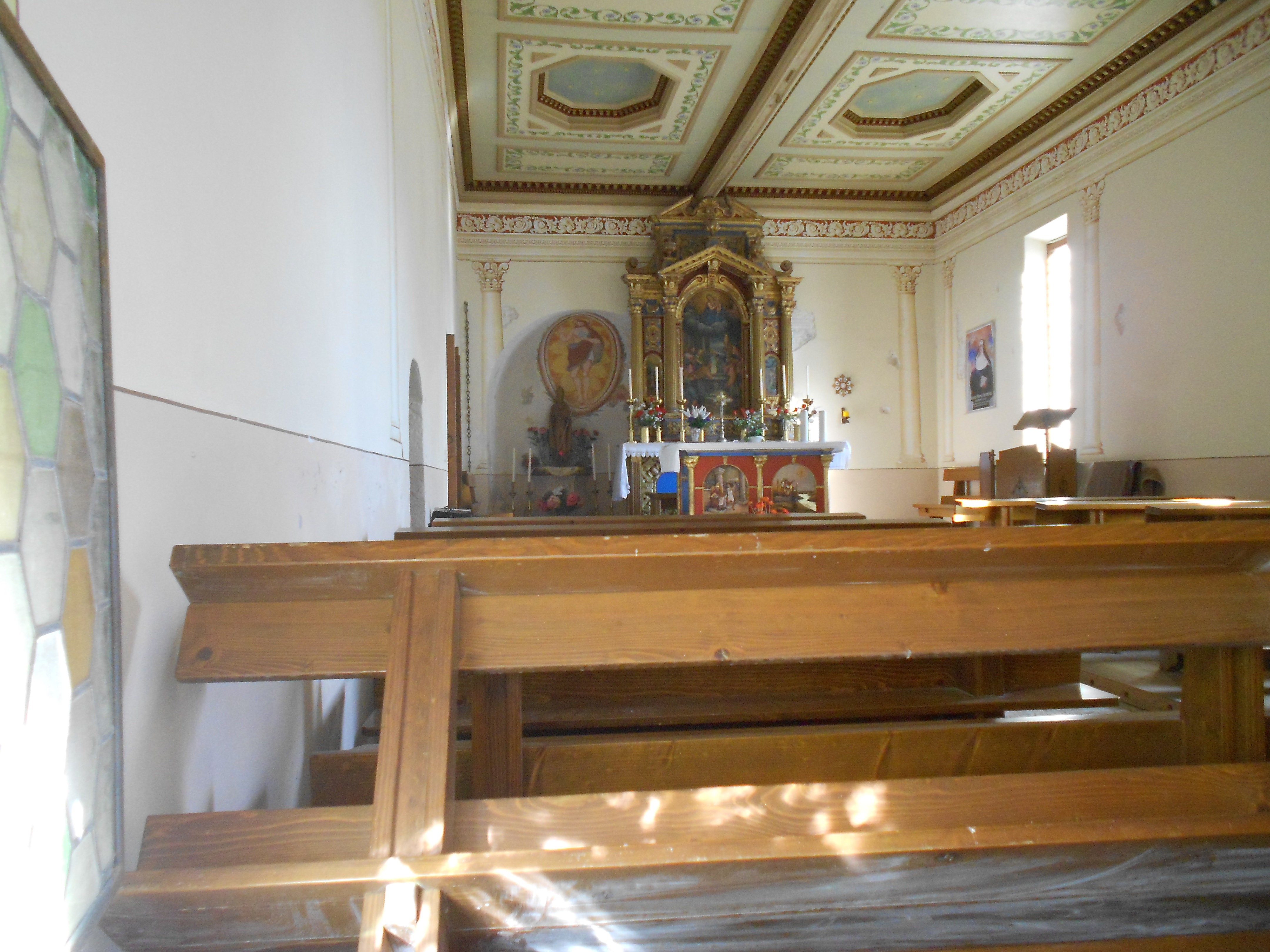 Vèneto: L de entre de la gesiòta de san Silvestro a Imèr